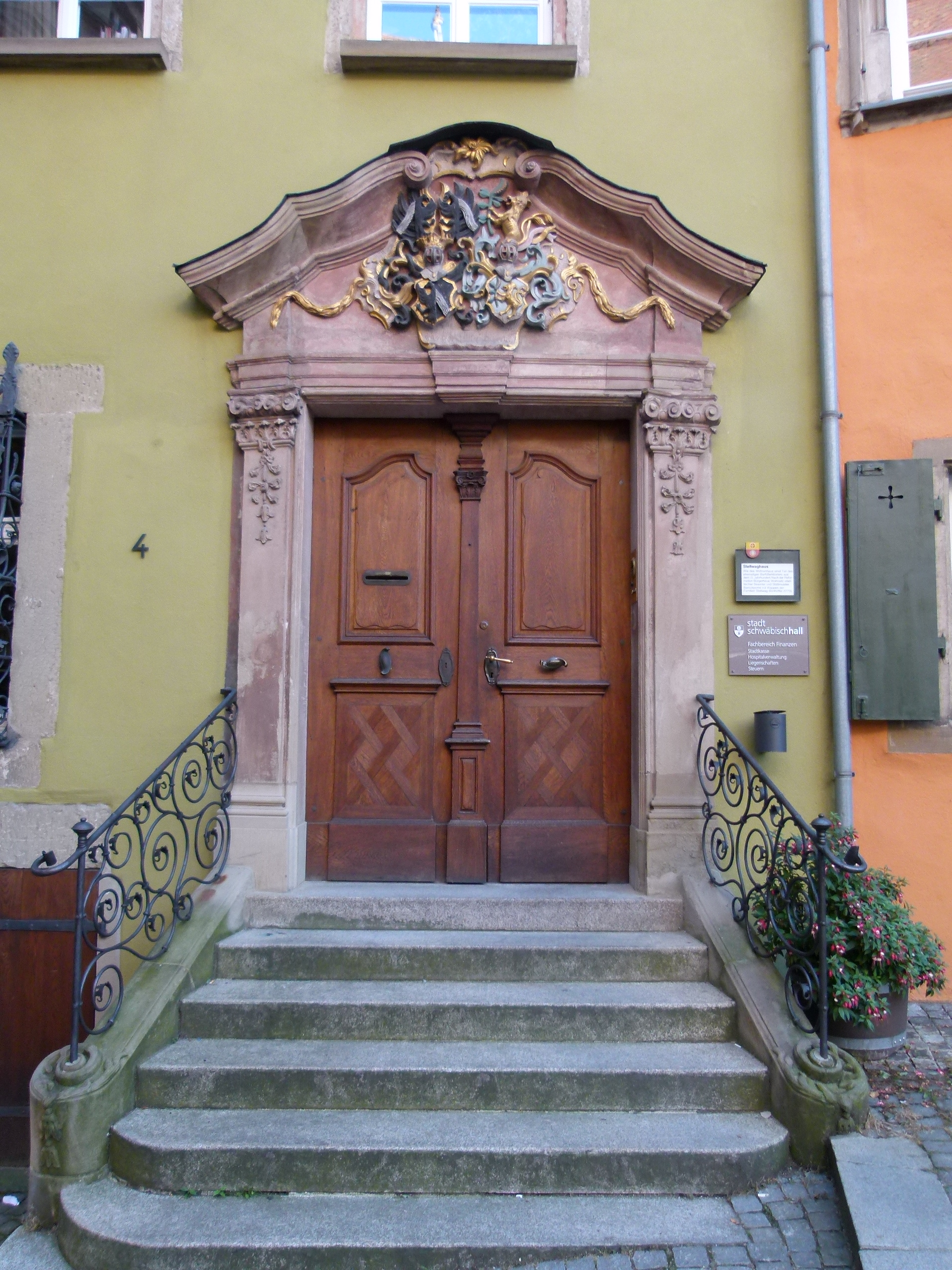 Denkmalgeschütztes Haus, Am Markt 4, Schwäbisch Hall